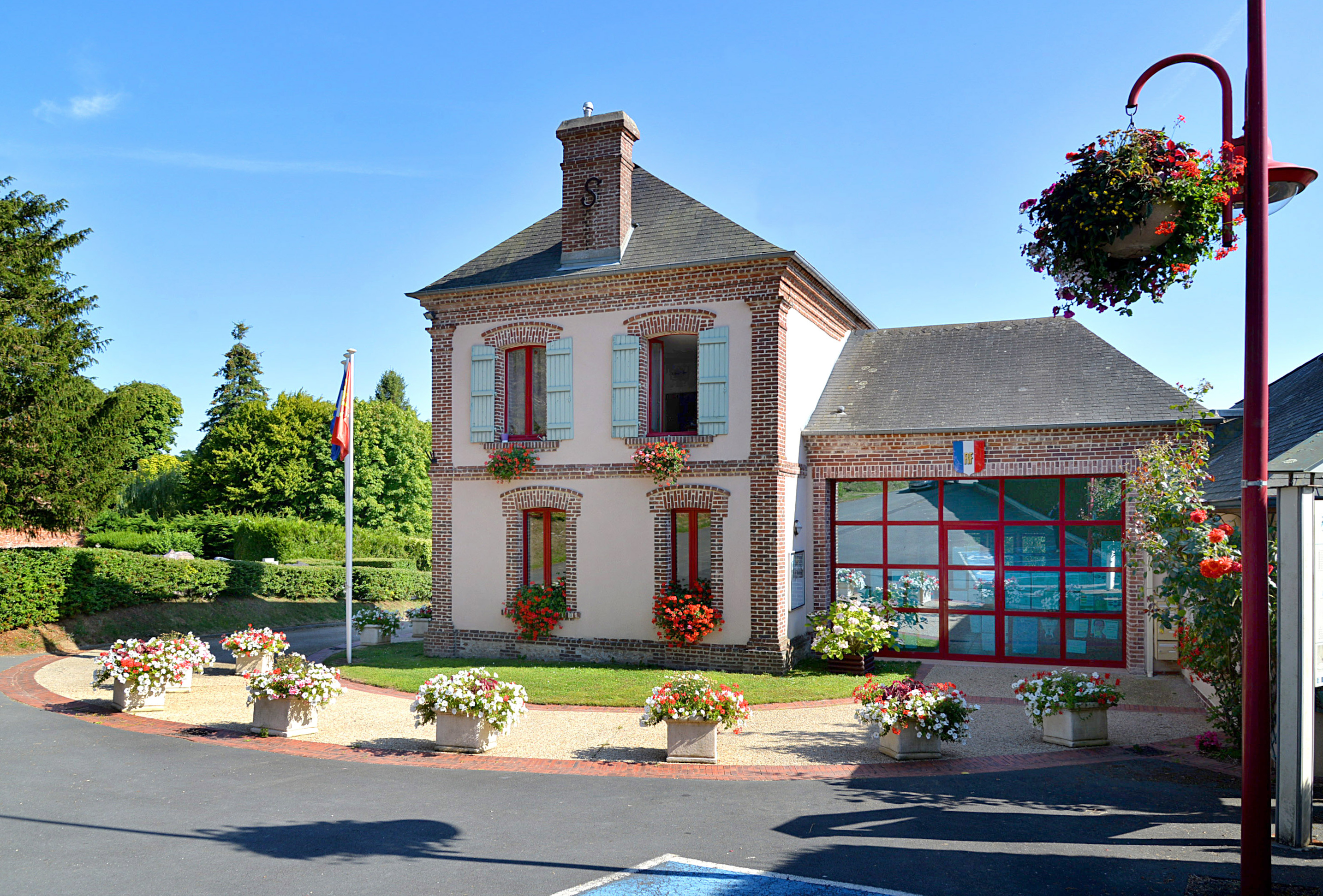 Surville (Calvados)